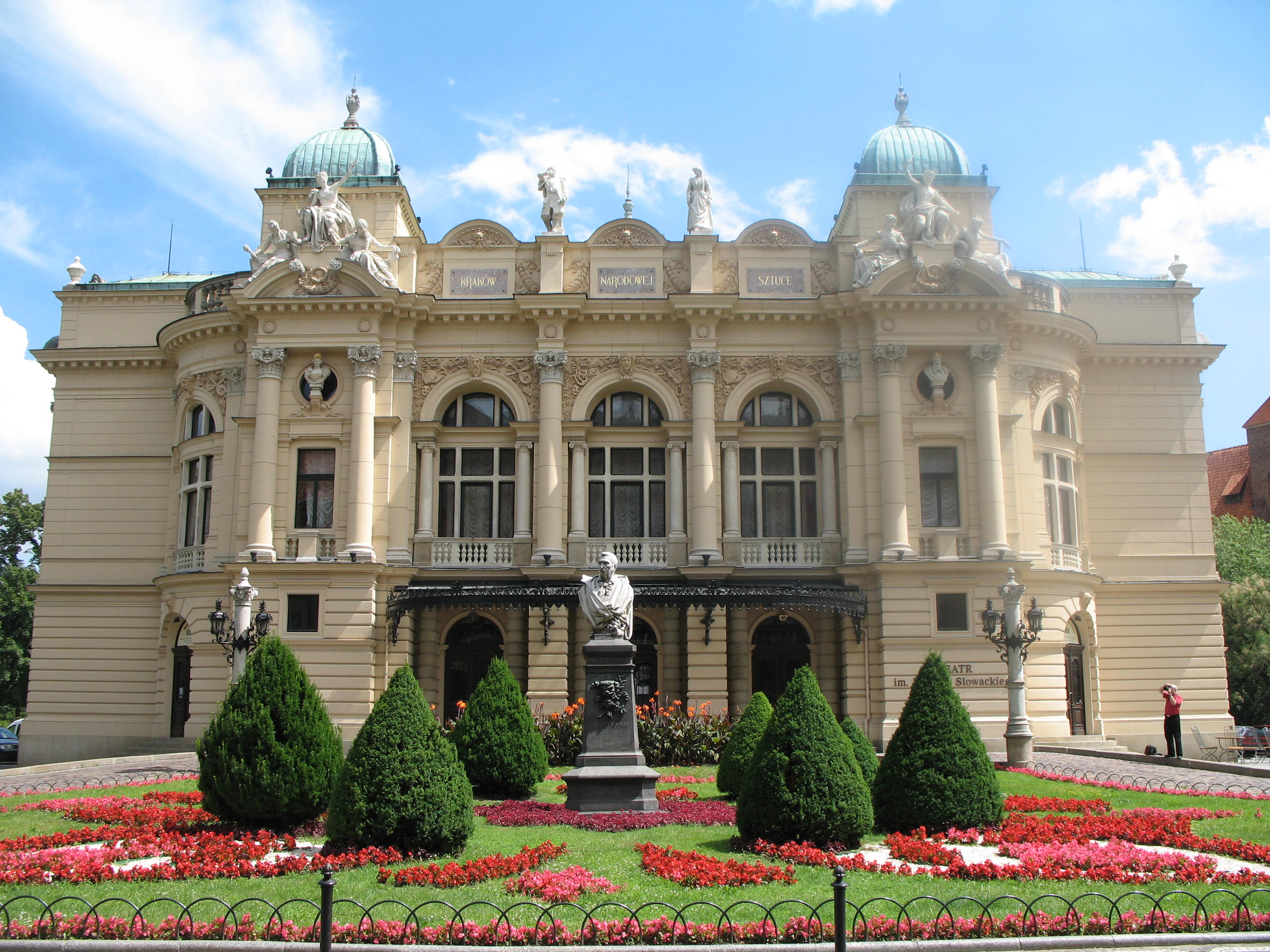 Walls in Kraków, Poland